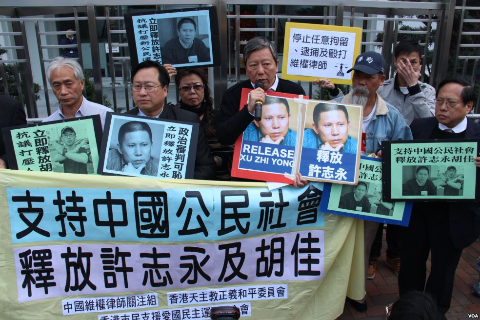 中文（中国大陆）: 2014年1月27日，香港数个人权团体前往中央政府驻港机构中联办，抗议当局打压公民社会，要求立即释放1月26日被判刑4年的许志永、同日被警察带走的人权活动人士胡佳，以及所有被拘押的维权人士。到目前为止，胡佳自周日傍晚被北京国保带走传唤后，毫无音信，引发外界关注。